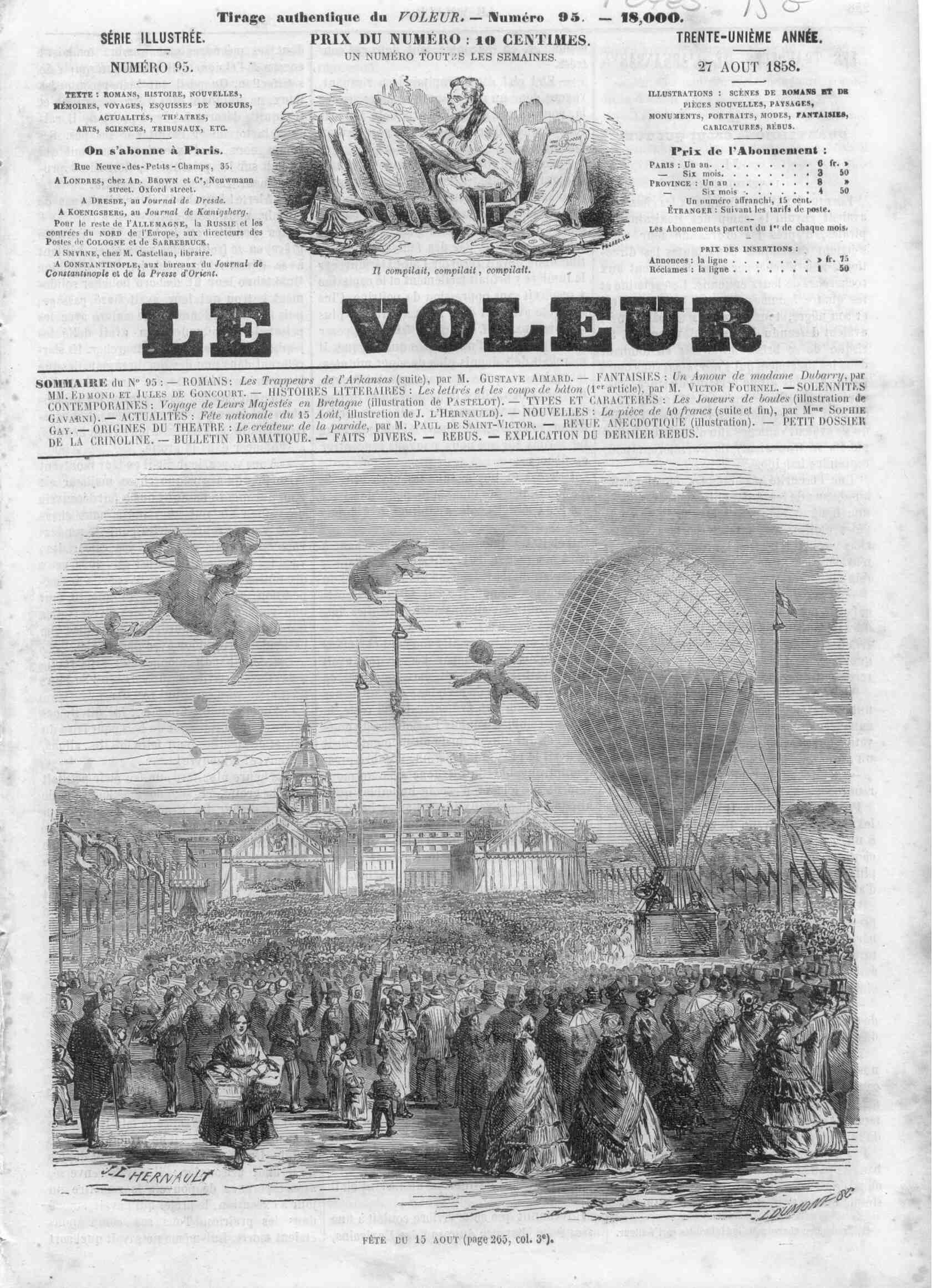 Couverture du journal Le Voleur